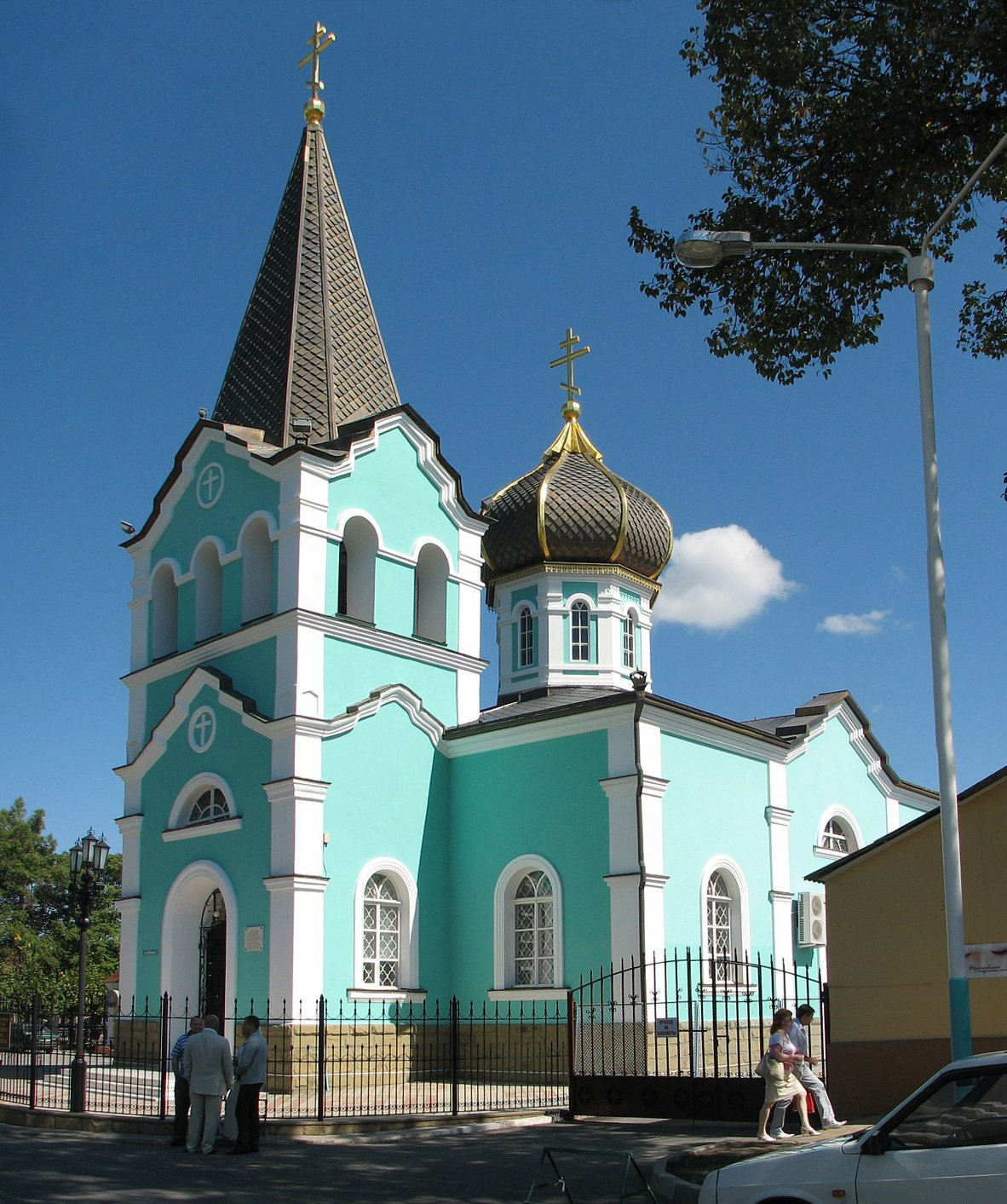 Свято-Онуфриевский храм в Анапе